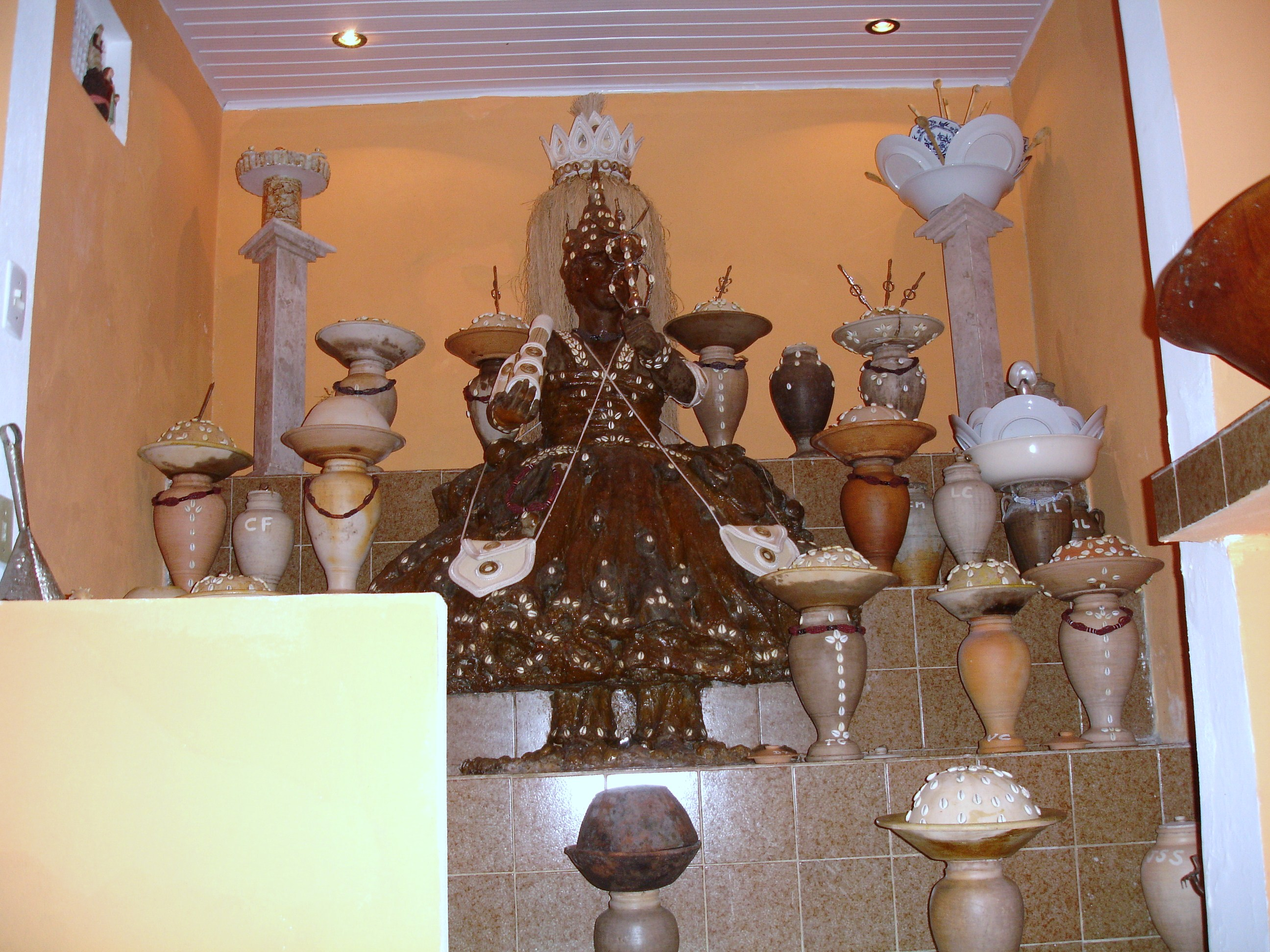 Acentos de Sakpata e Buruku orossi